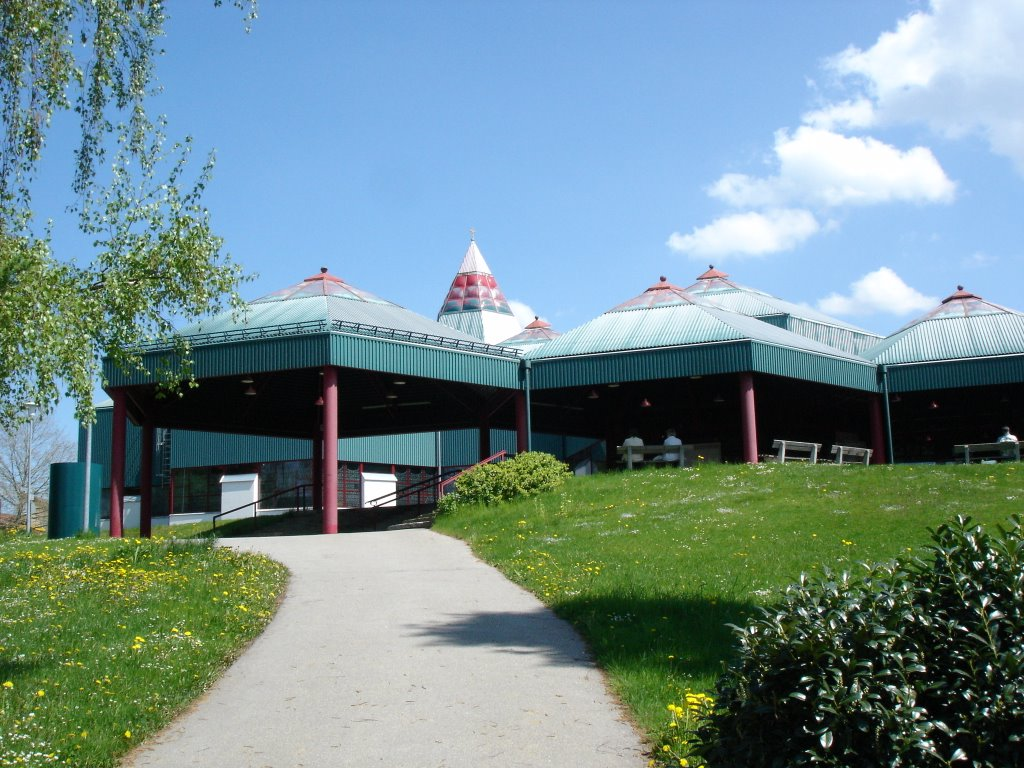 Herz-Jesu- und Mariä-Sühne-Kirche („Maria vom Sieg“) Opfenbach-Wigratzbad/Allgäu. Architekt: Gottfried Böhm